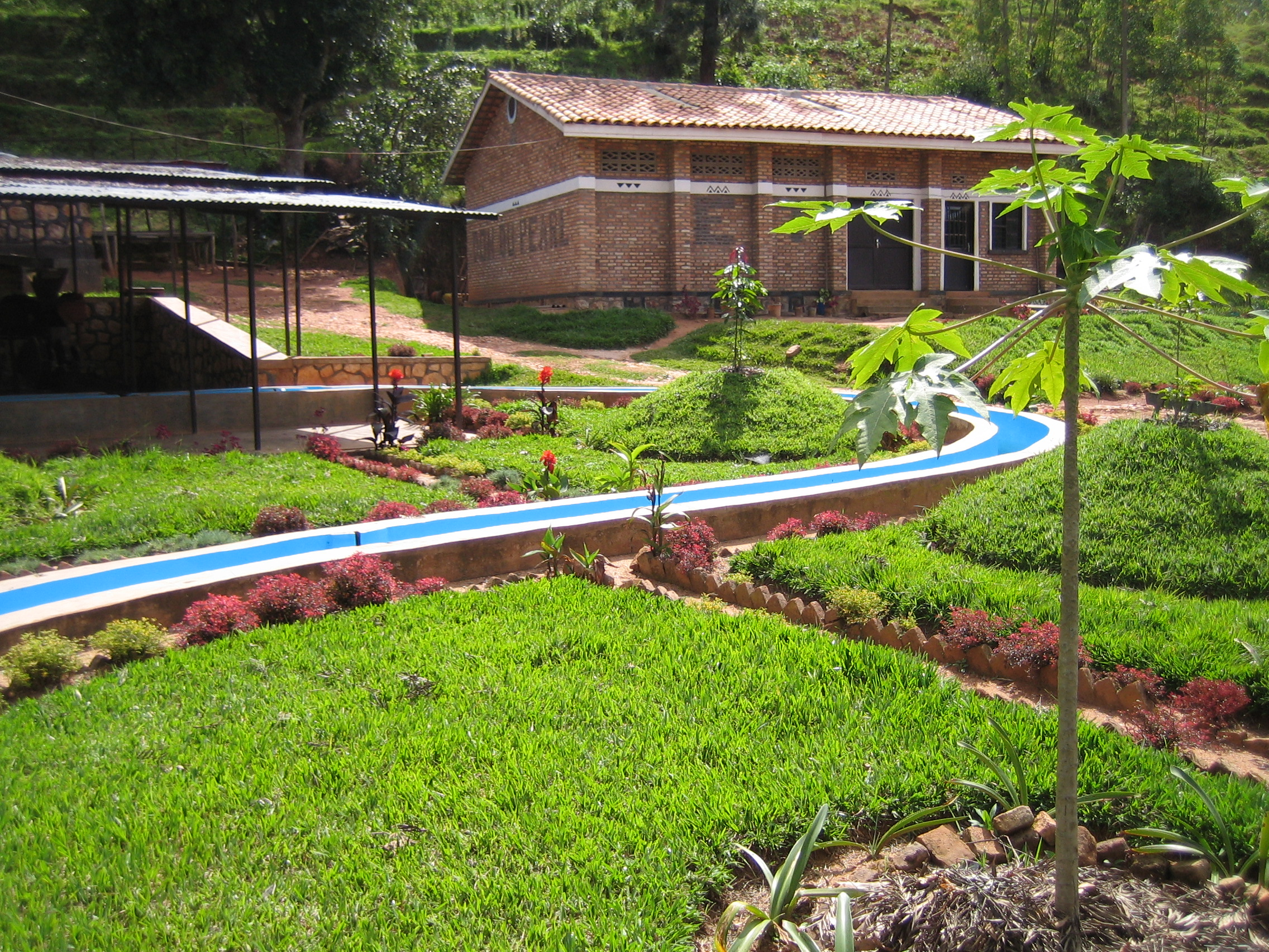 Taken by SteveRwanda